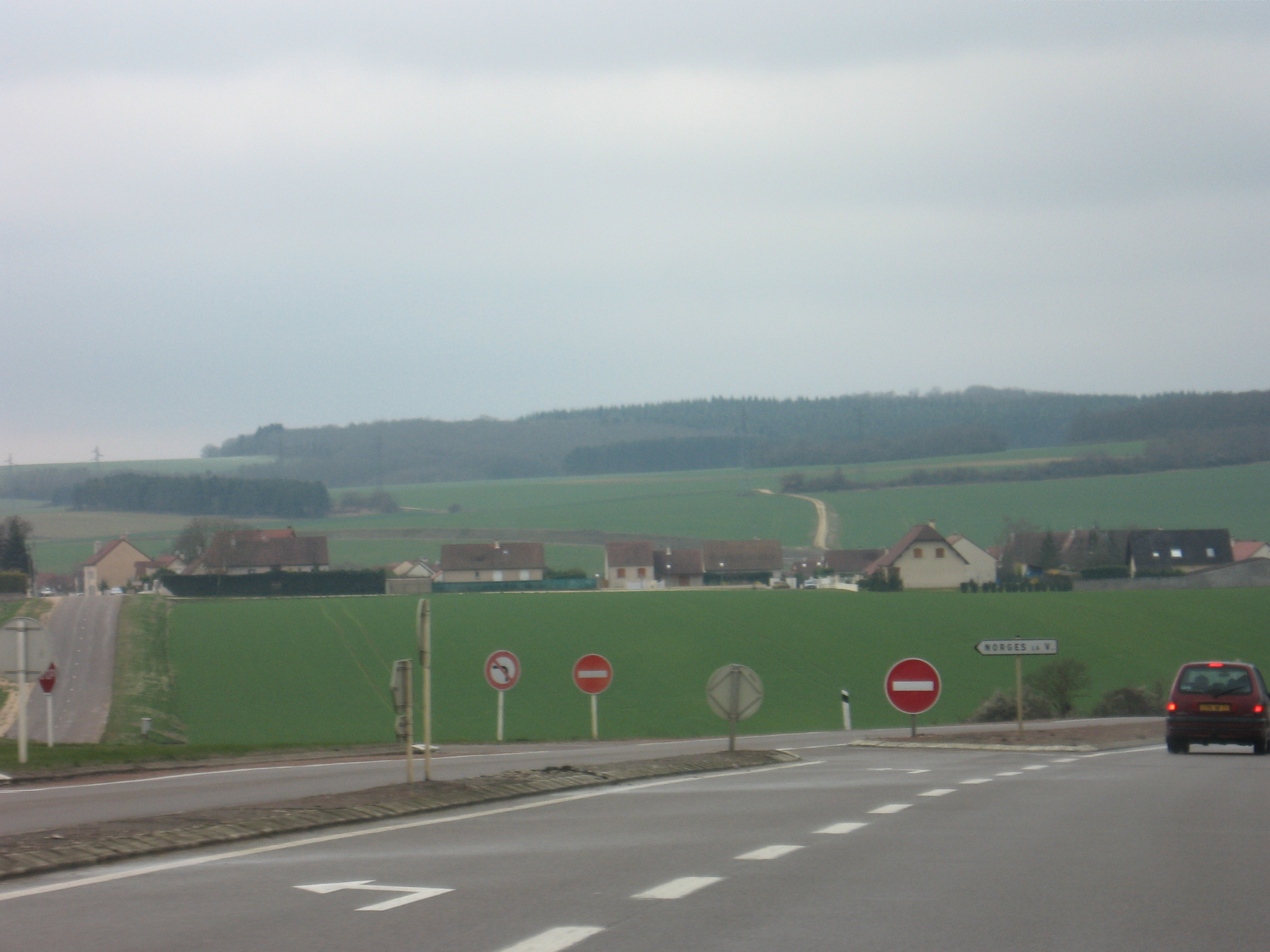 Norges-la-Ville (Côte-d'Or)